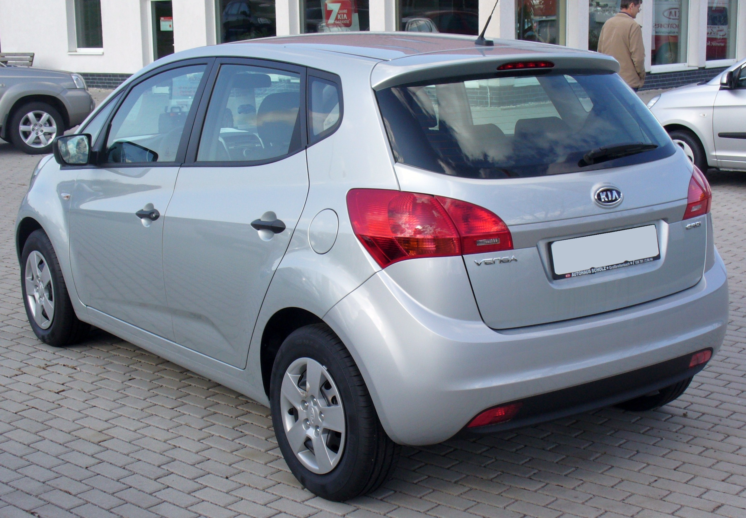 Kia Venga